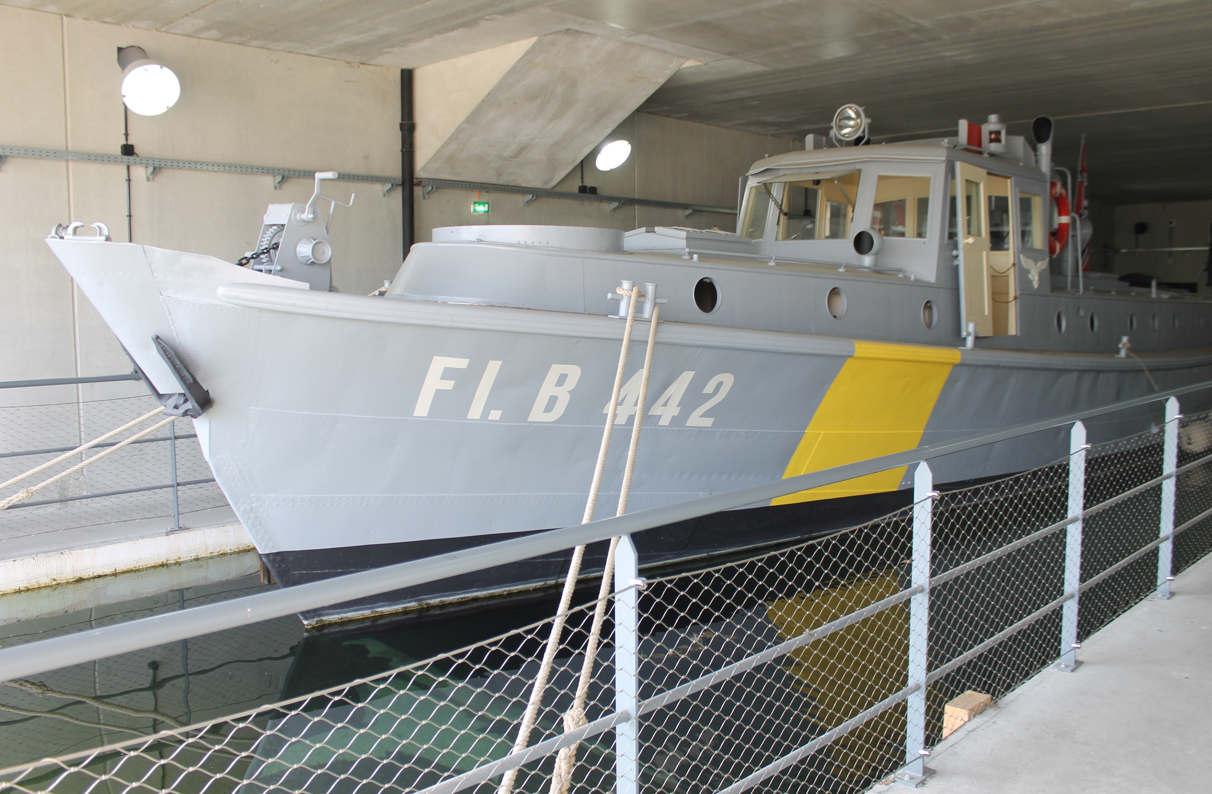 MM Parc France, Bootshangar